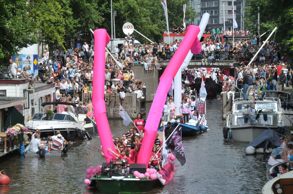 Jong & Out